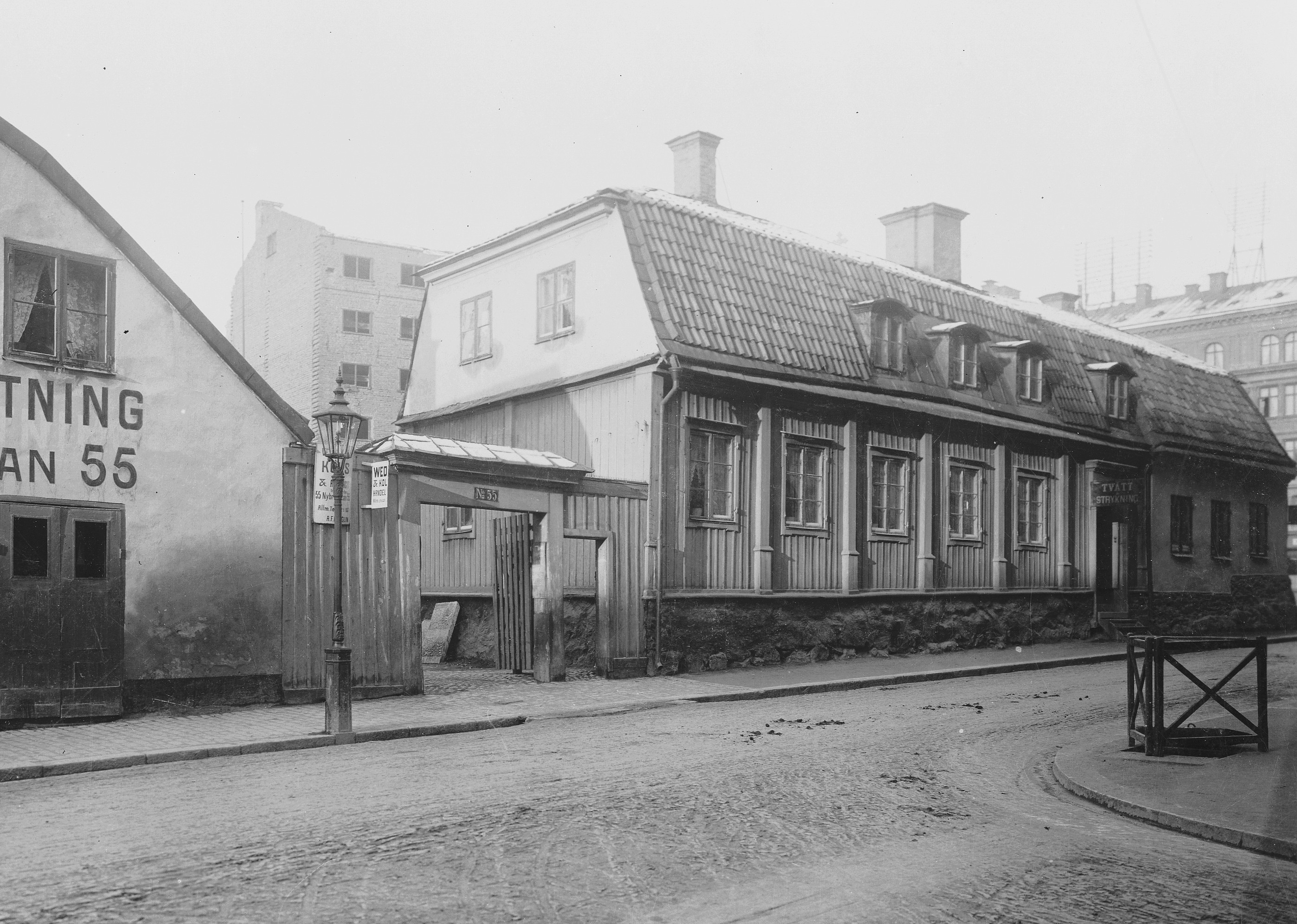 Kammeckers malmgård (revs 1907). I bakgrunden skymtar det Brandelska sockerbruket.